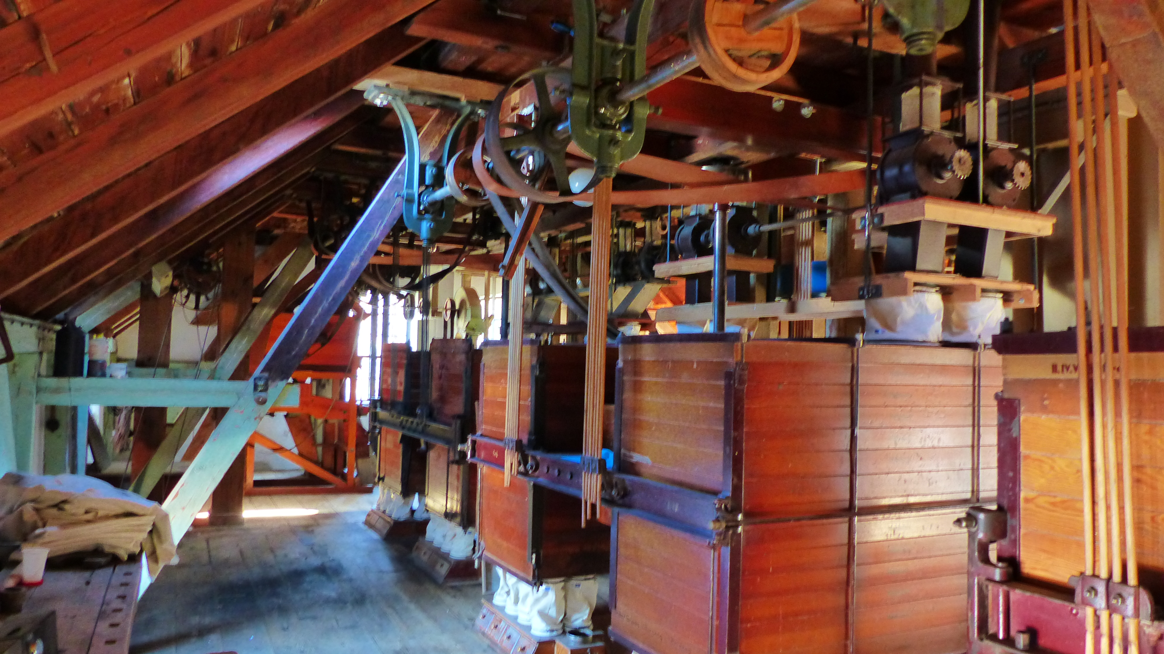 Hammermühle-Eisenhammer, Seidauer Straße 2; 4, Bautzen